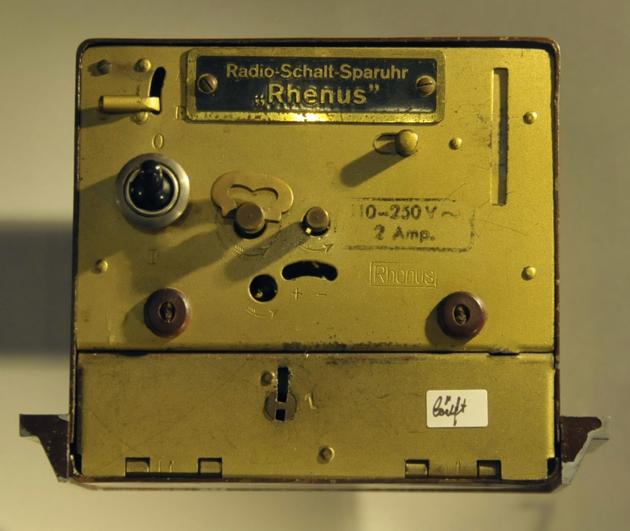 Rhenus Radio-Schalt-Sparuhr, Exponat im Gothaer Versicherungsmuseum